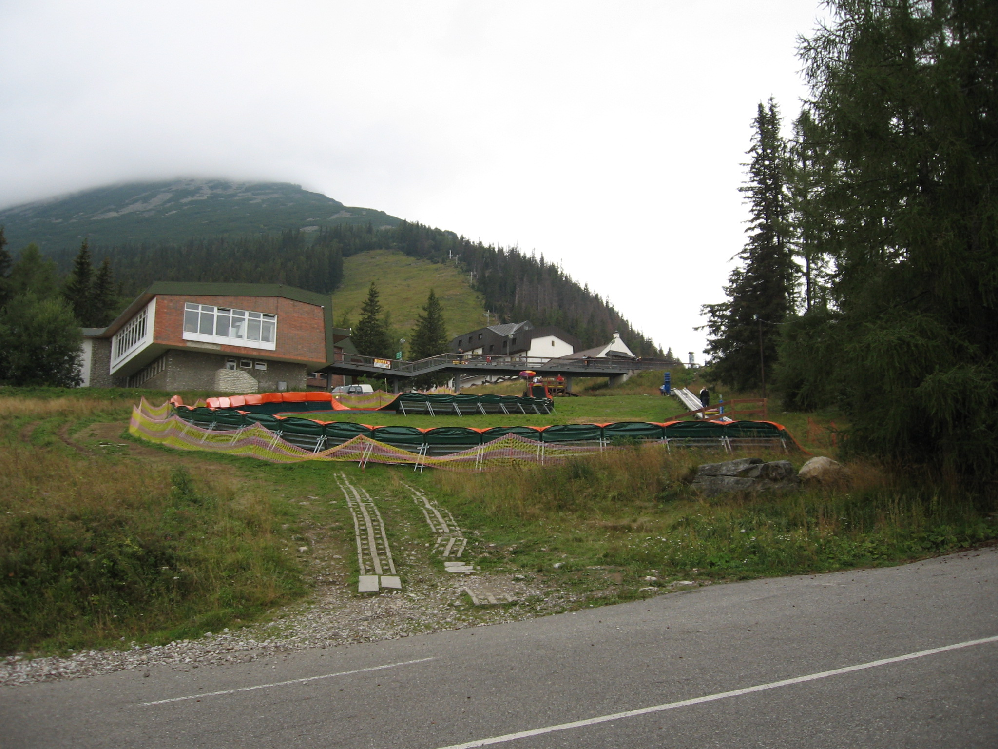 Vľavo vrcholová stanica pozemnej lanovej dráhy zo Starého Smokovca na Hrebienok, vpravo horský hotel Hrebienok